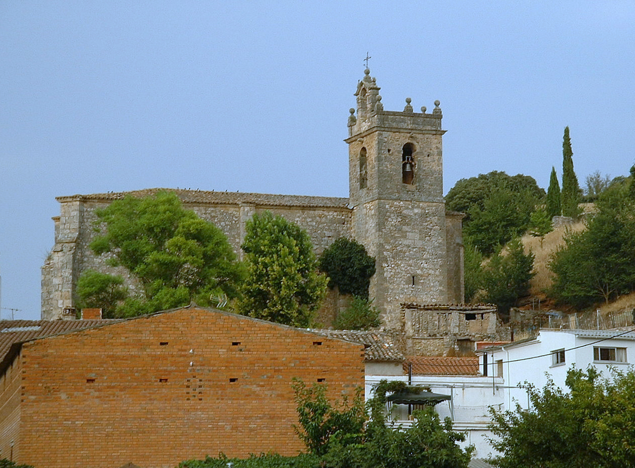 Iglesia de Yélamos de Arriba vista desde la vega